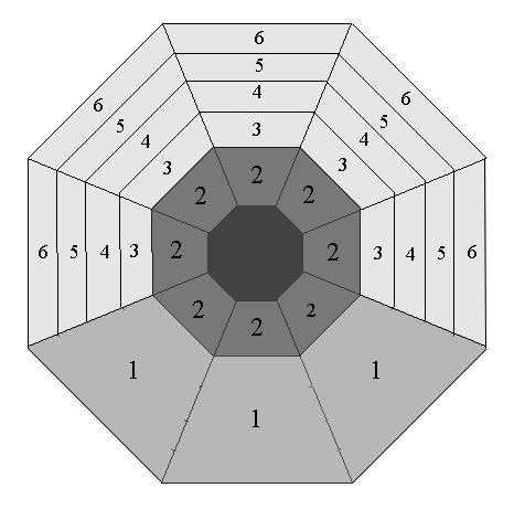 FirenzeBattisteroSchemaCupola